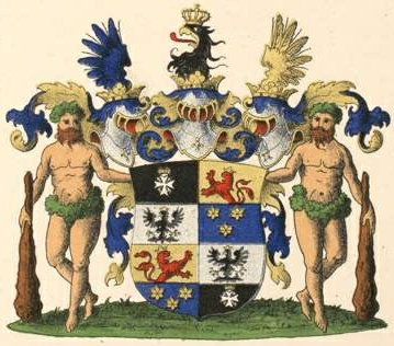 Sassi suguvõsa vabahärravapp